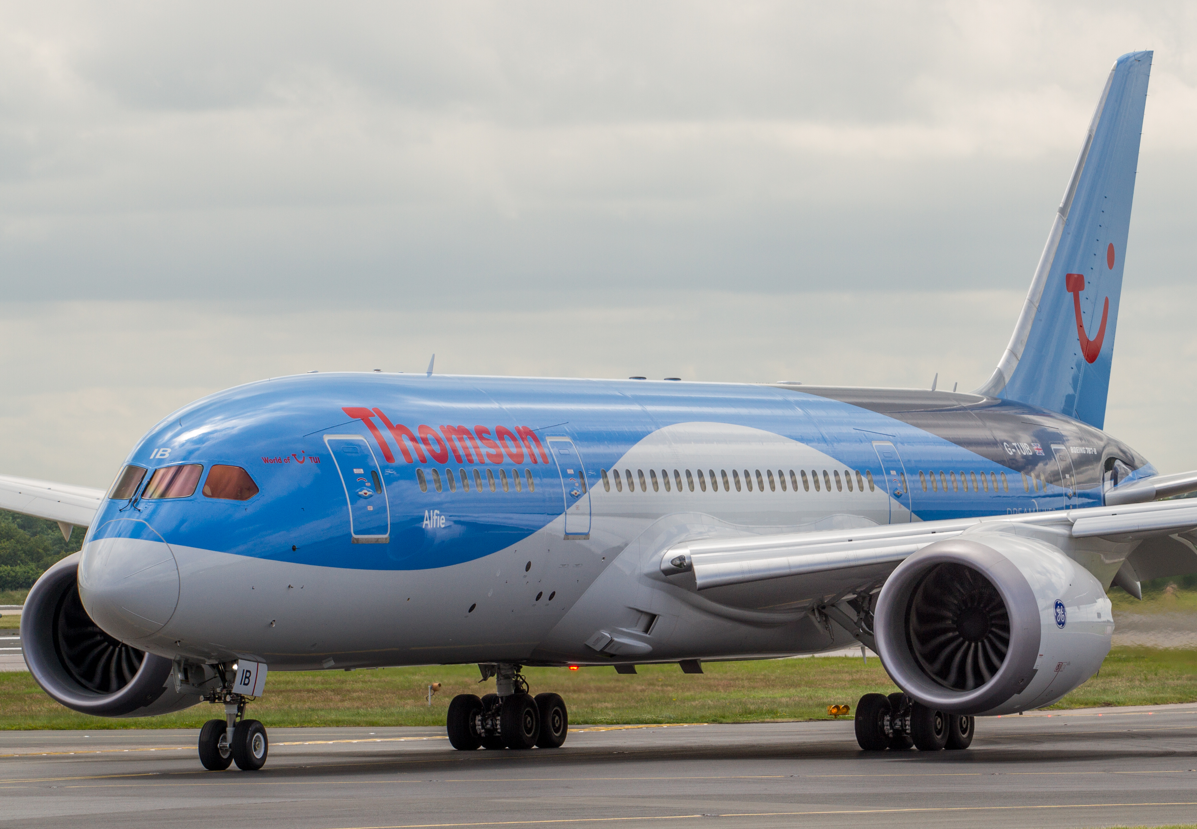 Manchester 30.06.13